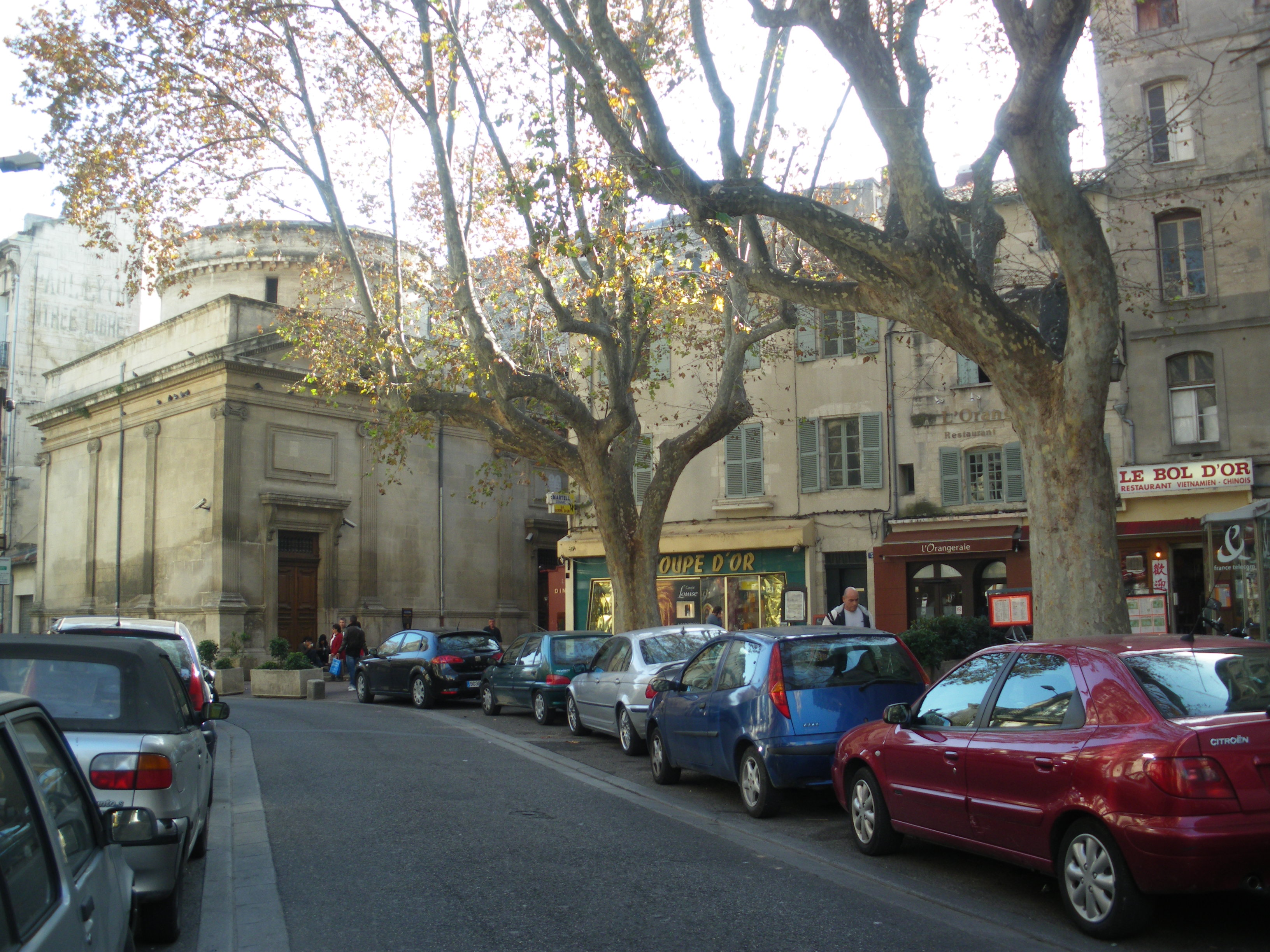 Place de Jerusalem à Avignon, avec vue sur la Synagogue